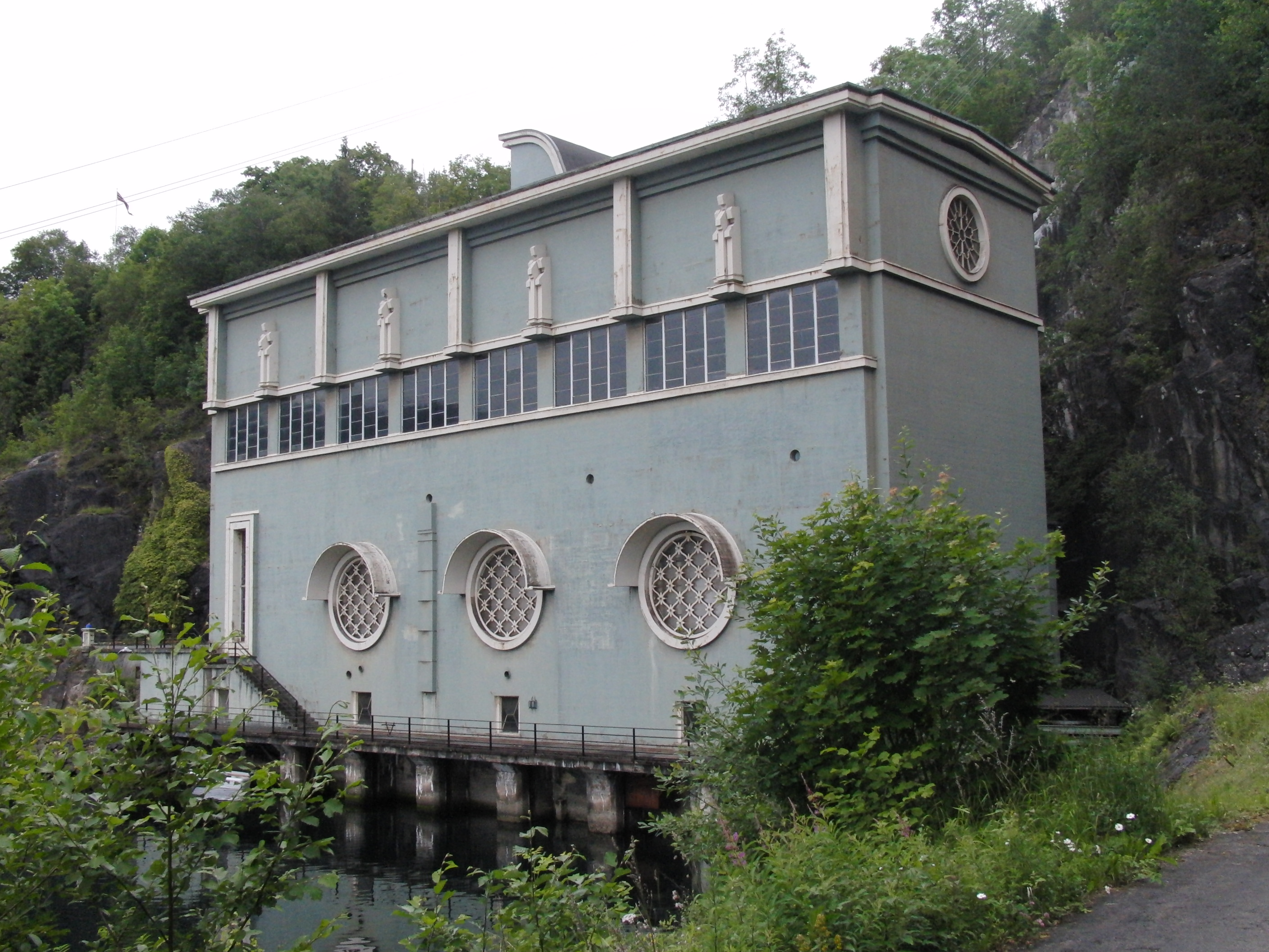 Sauda III kraftverk, Sør.